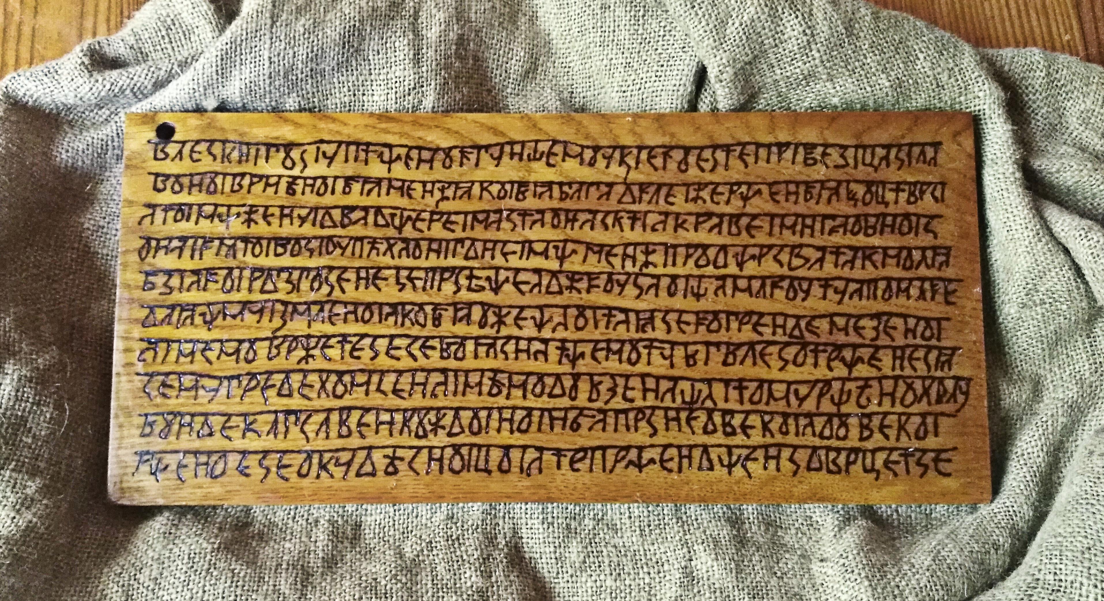 Фотографія реконструкції Дощечки Ізенбека з фонду РО "Релігія Природи"